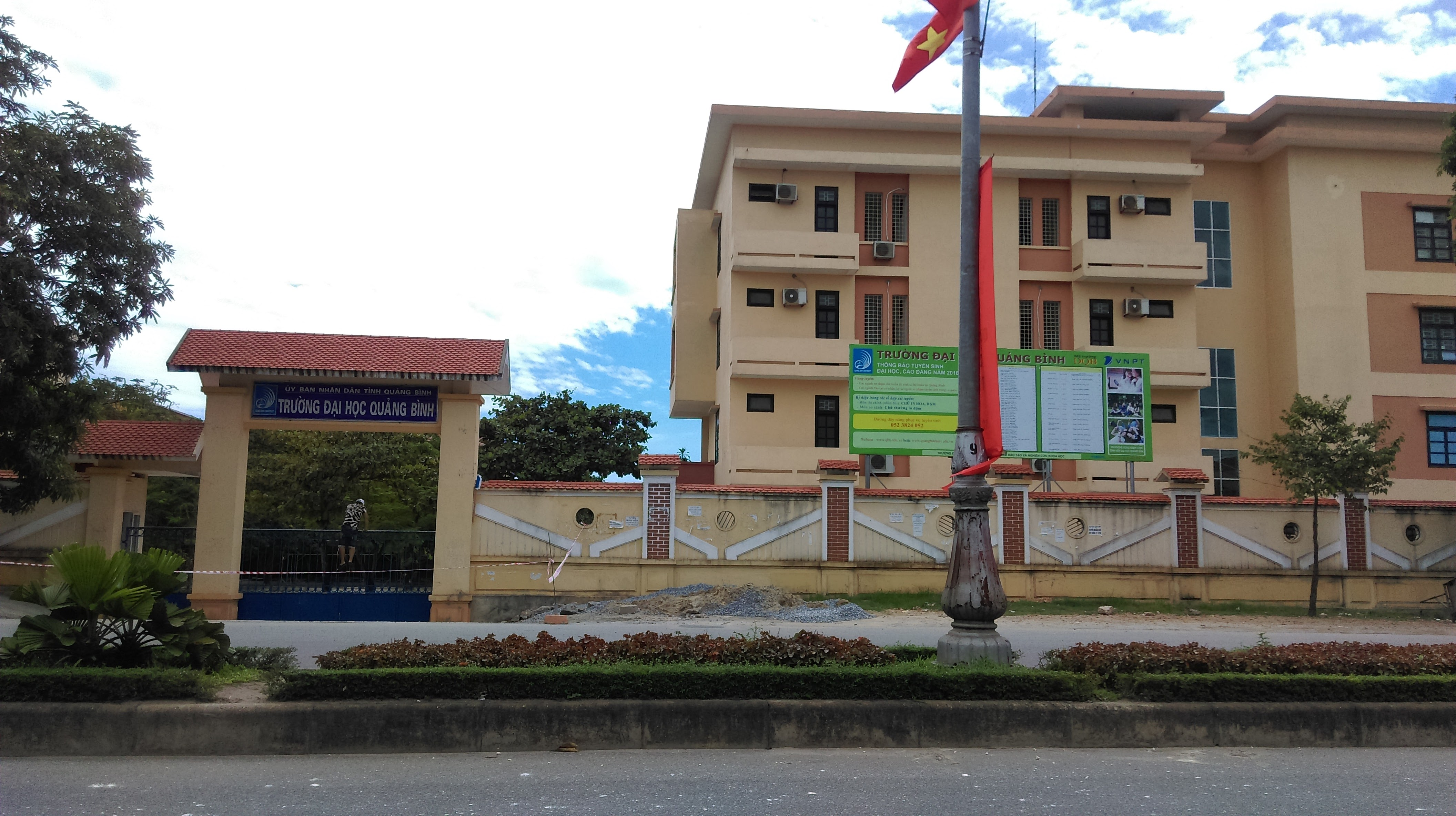 Trường Đại học Quảng Bình